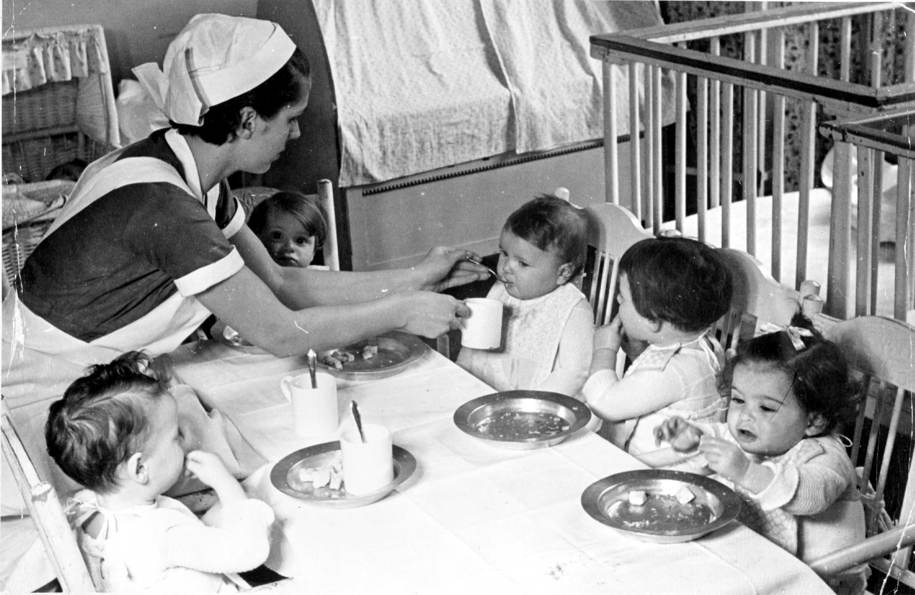 Kinderverzorgster van de joodse creche aan de Plantage Middenlaan in Amsterdam voert de kinderen, circa 1940